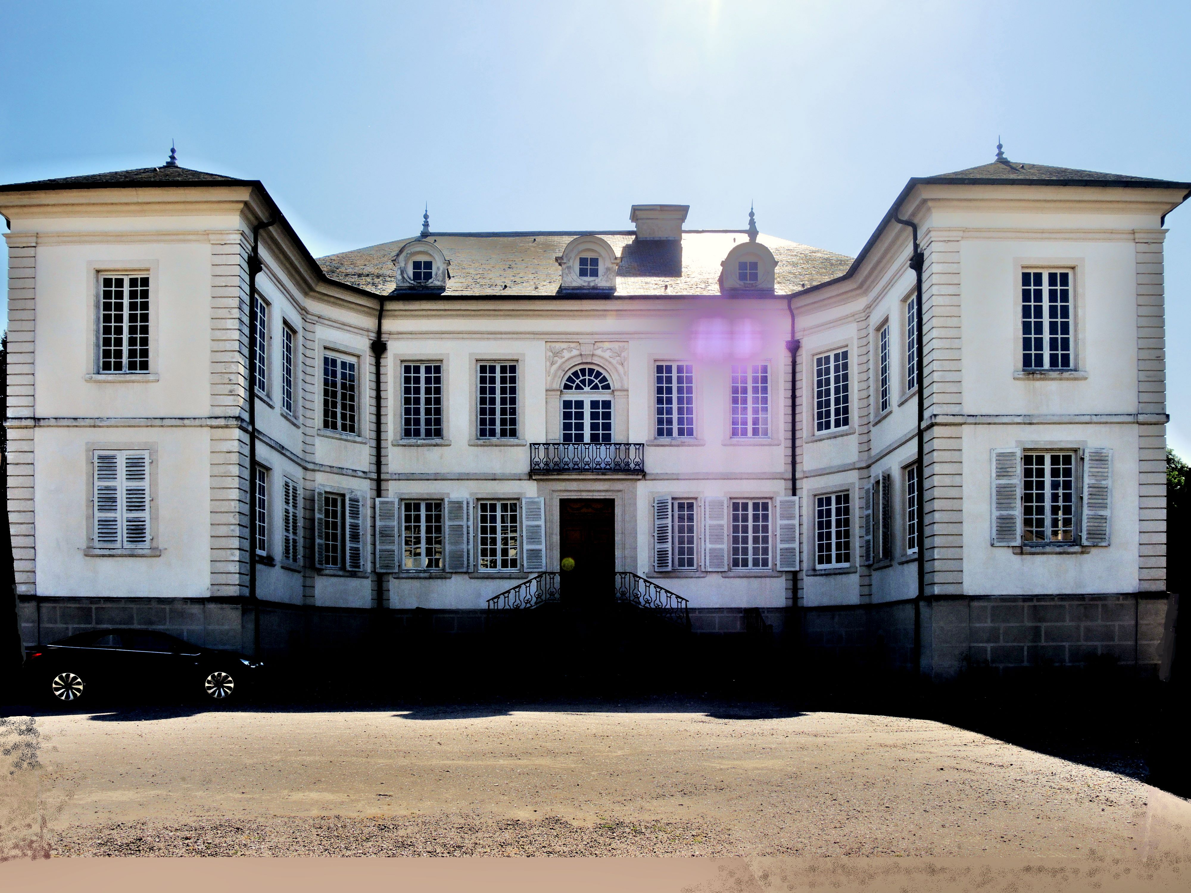 Château des Bouly, daté de 1775.